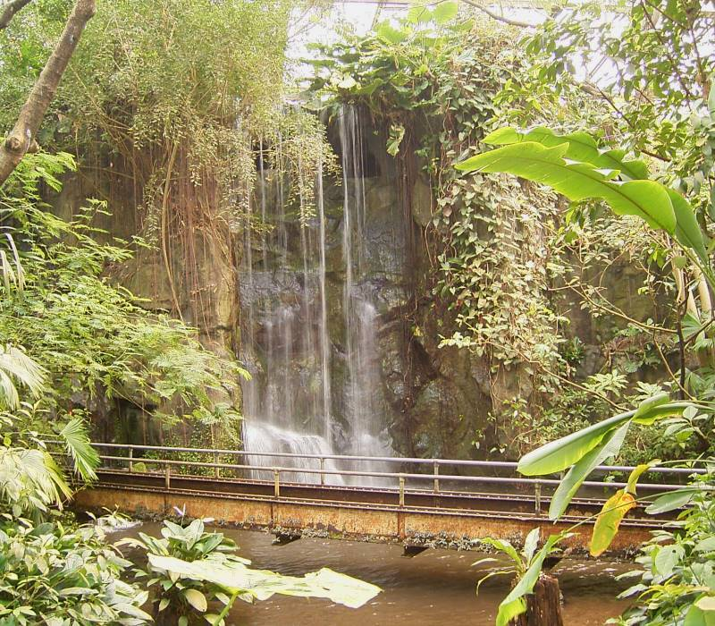 Burgers Zoo, NL